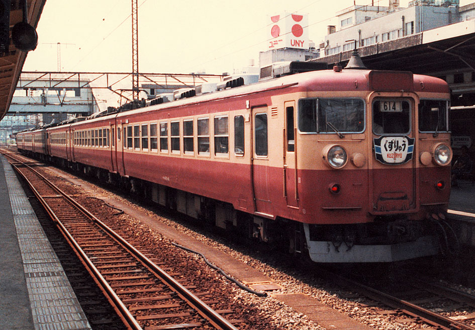 国鉄 475系急行形電車 急行「くずりゅう」